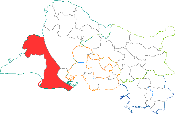 Situation du canton dans le département des Bouches-du-Rhône (France)